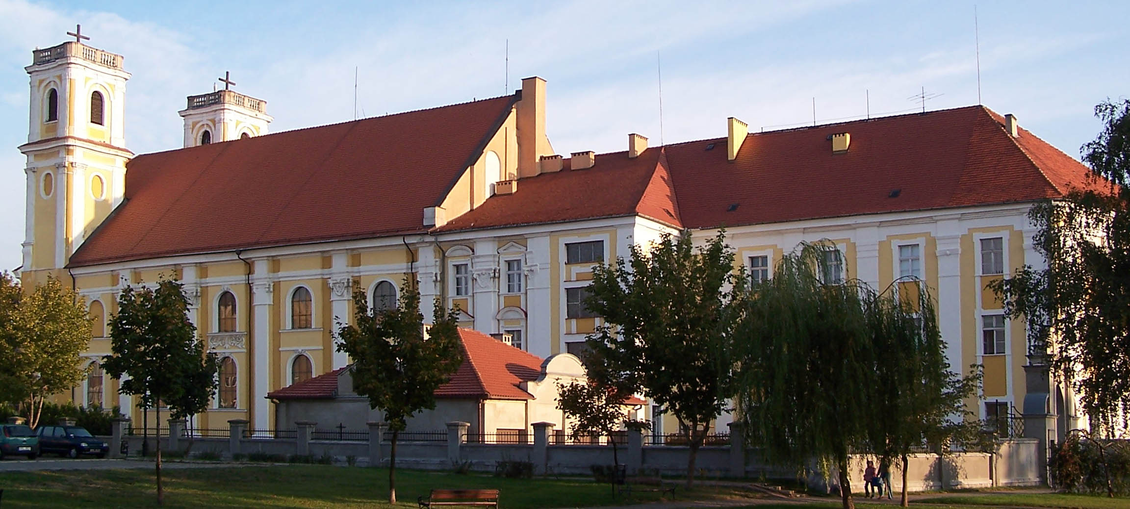 Pojezuicki kościół Bożego Ciała w Głogowie od południowego wschodu.